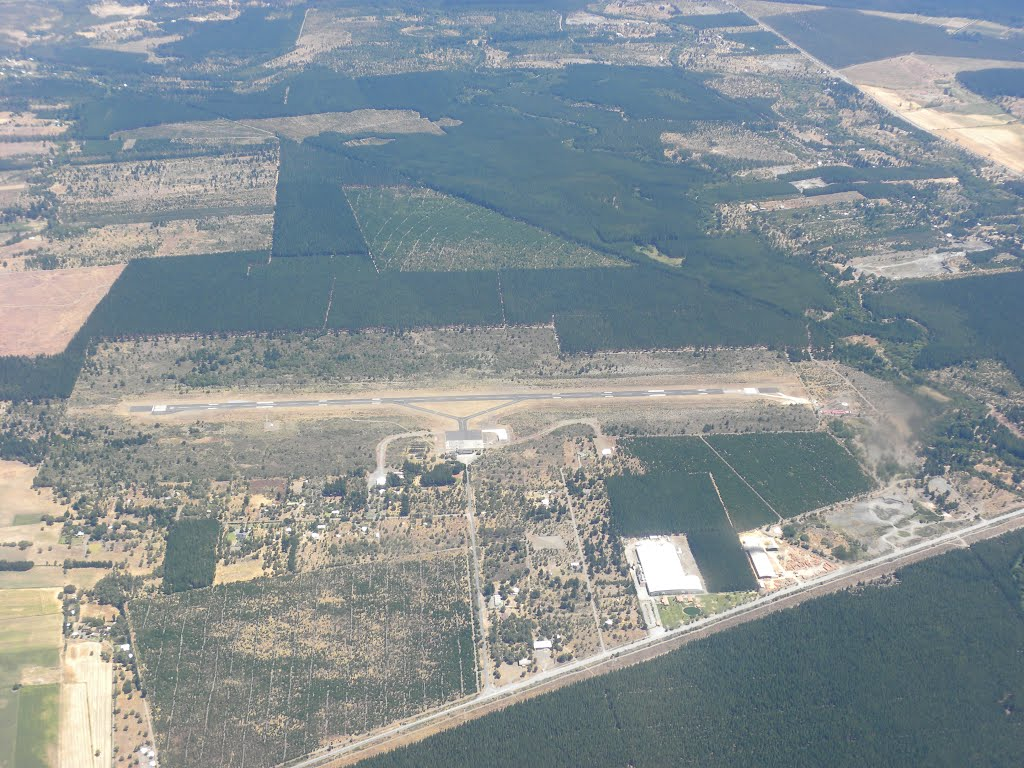 Pista 1700 mts